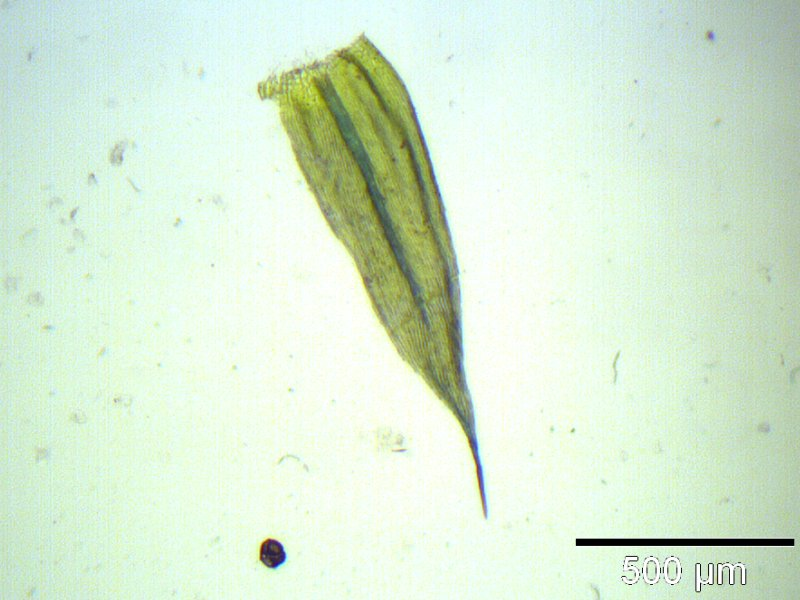 Seidenmoos (Homalothecium sericeum), Blatt, 40x vergrößert